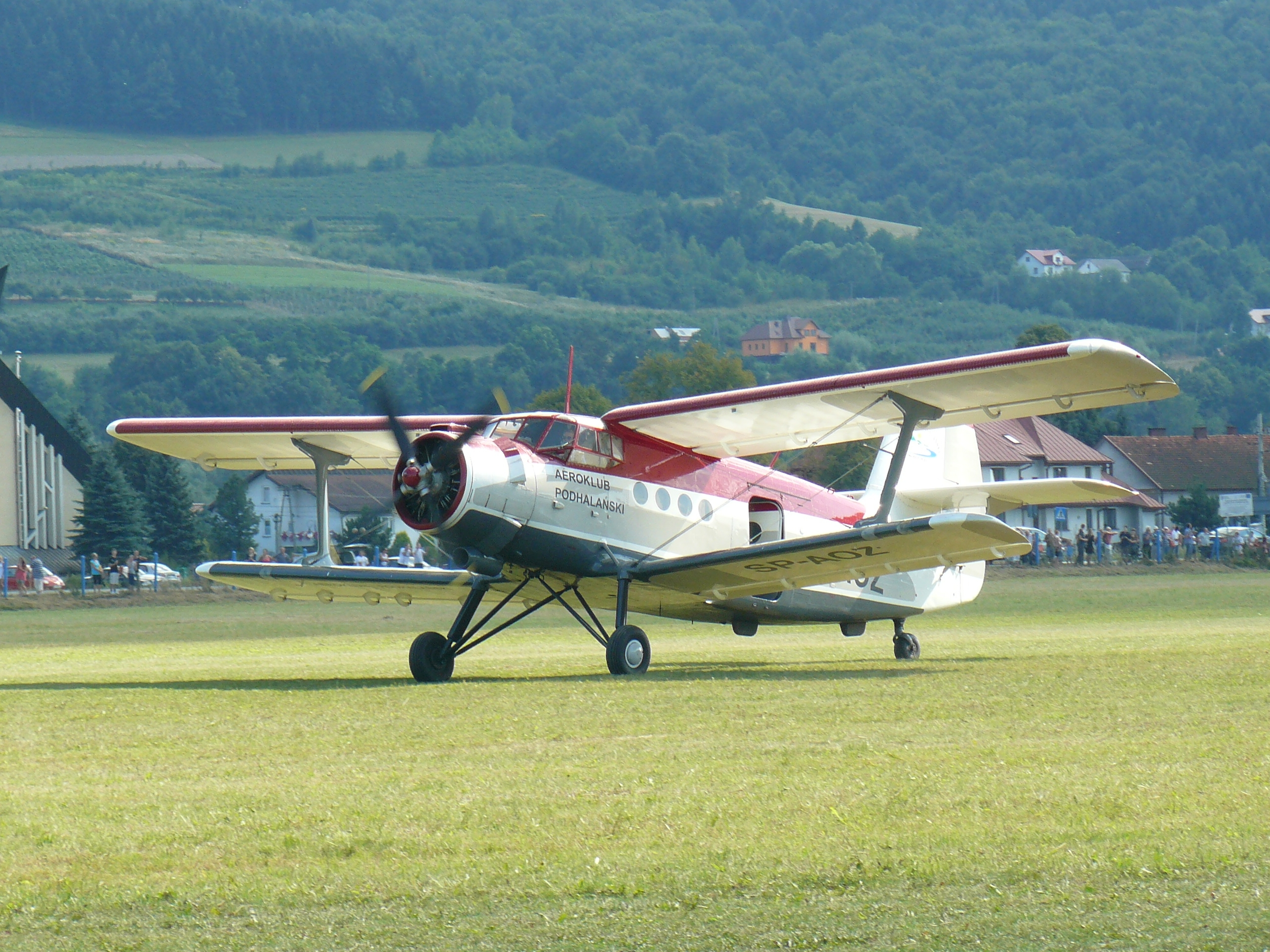 An-2 własność Aeroklubu Podhalańskiego